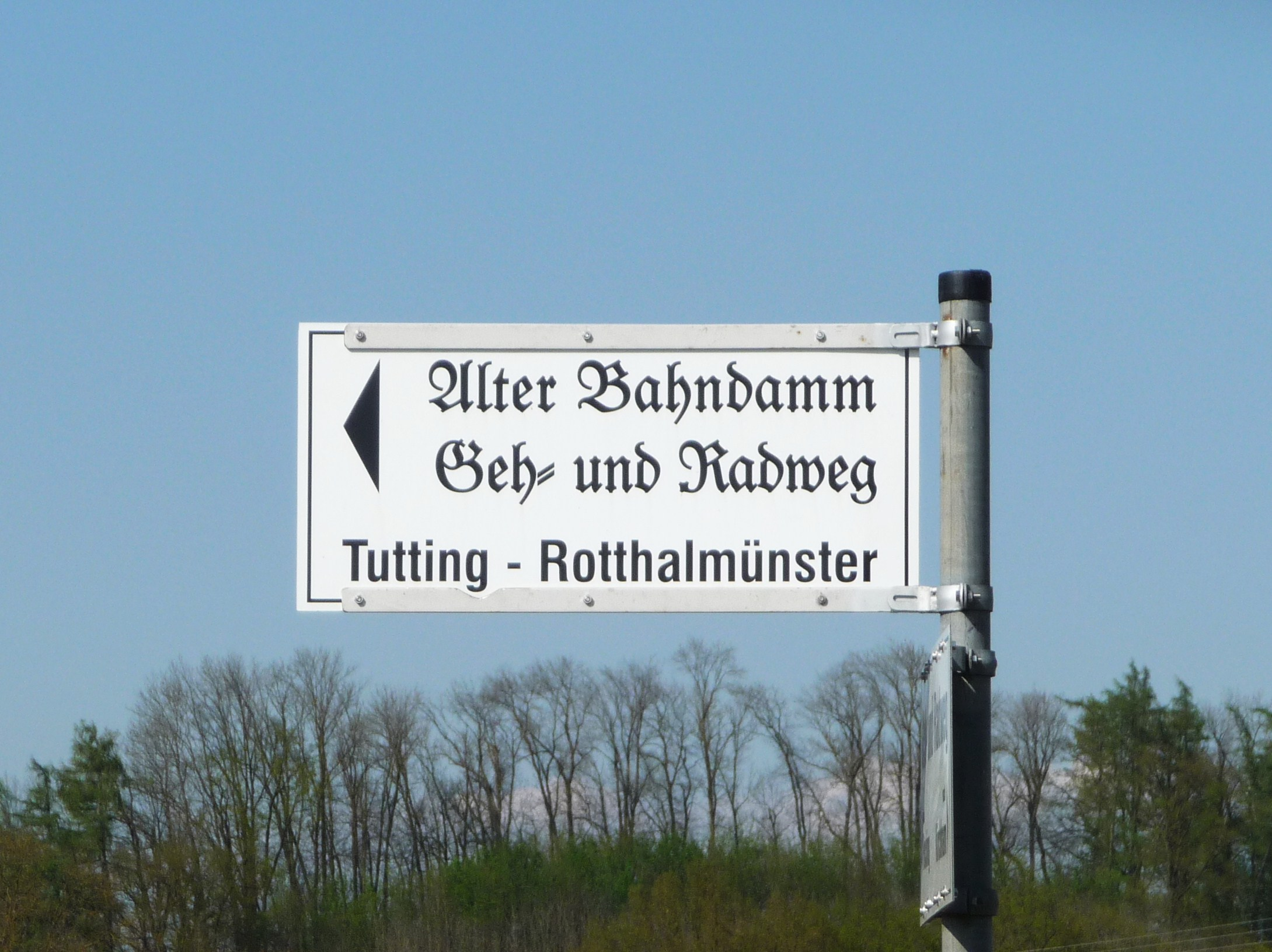 Hinweisschild auf die ehemalige Bahnstrecke von Tutting nach Rotthalmünster und Kößlarn am Beginn des Radweges in Tutting